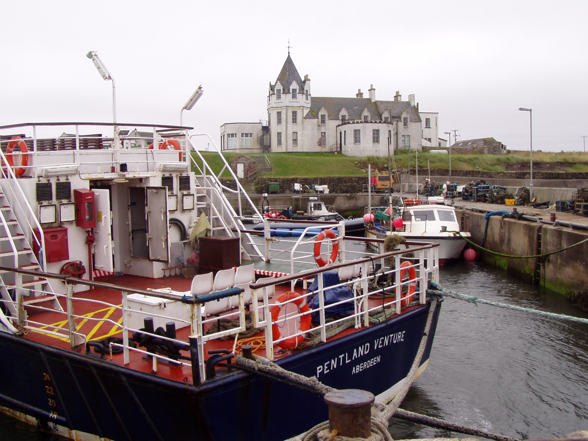 Haventje van John o'Groats